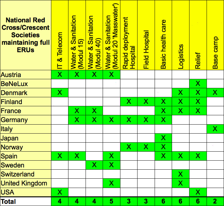 Übersicht der vollwertigen ERU Einheiten der Rot Kreuz & Roter Halbmond Gesellschaften der Welt. Stand 2010